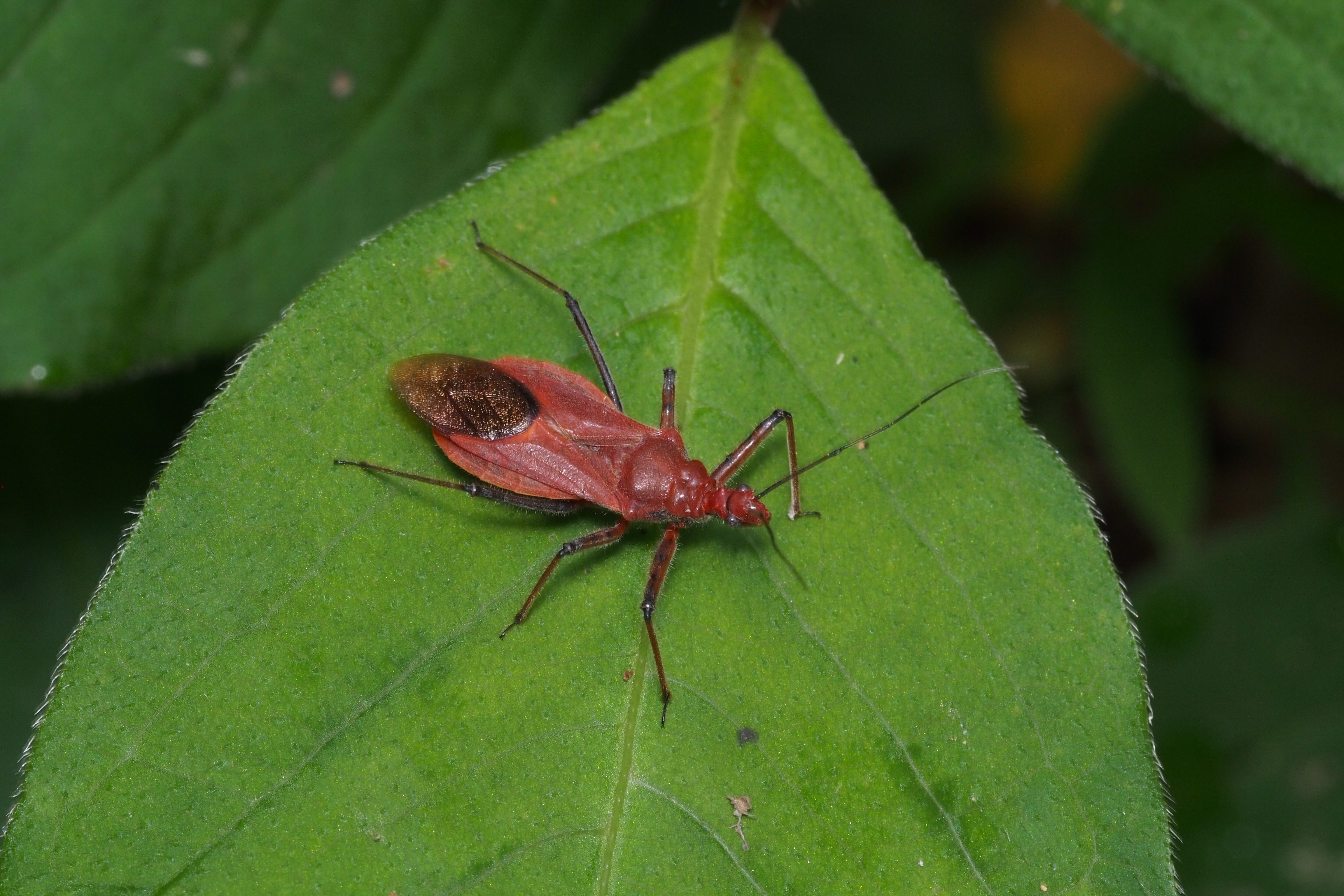 Cydnocoris russatus